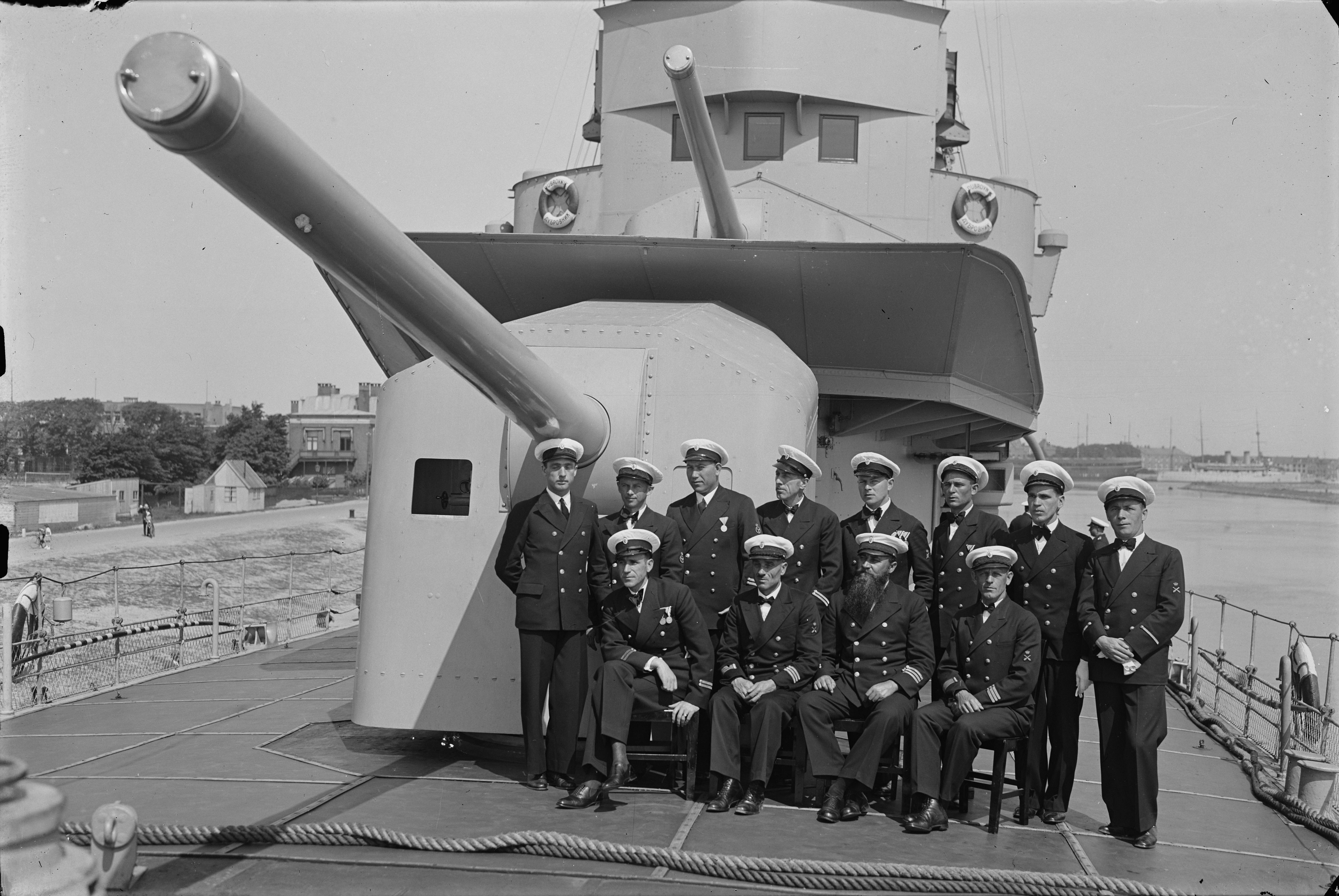 Холандски официри на палуби разарача Дубровник до топова Шкода 140 mm. Description Dutch officers on the deck of the destroyer Dubrovnik to Škoda 140 mm cannons.Date 4.6.1935.Source Flickr - Unknown/Dutch Navy/Archief Alkmaar Commons Dutch officers on the deck of the destroyer Dubrovnik to Škoda 140 mm cannons.